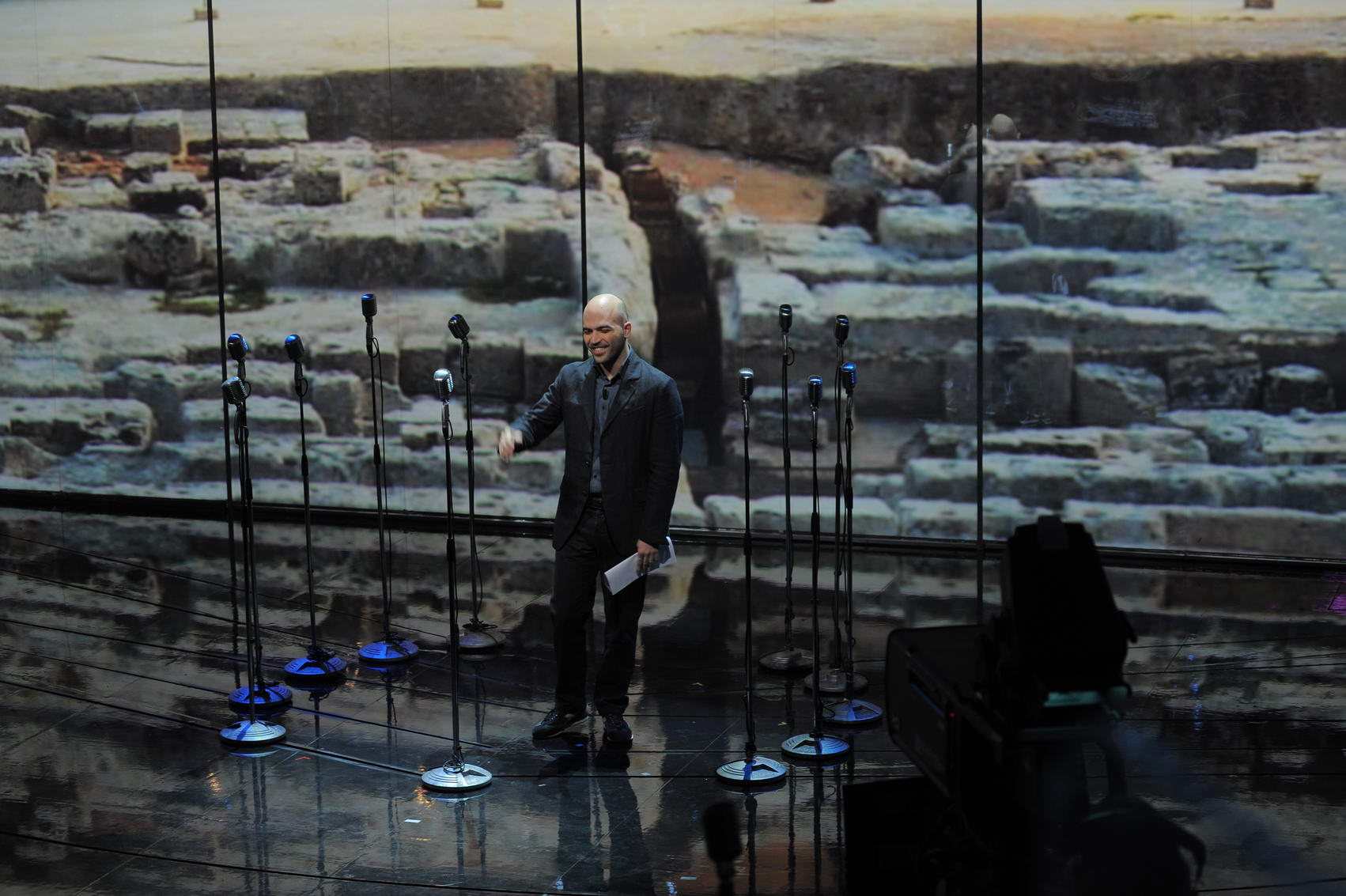 Foto ritraente Roberto Saviano sul palco di Vieni via con me